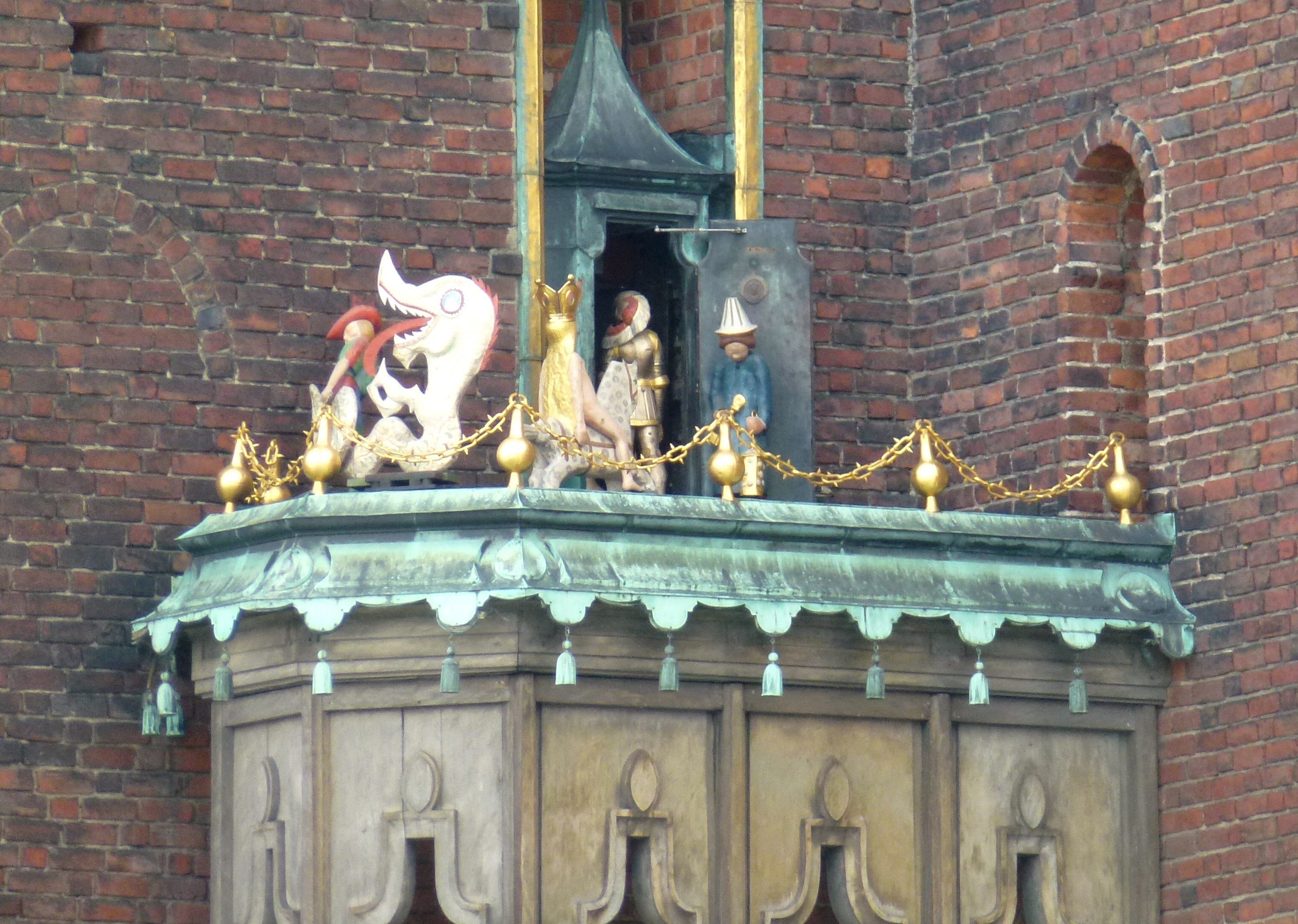 Stadshuset Örjanspelet, figurgruppen på balkongen